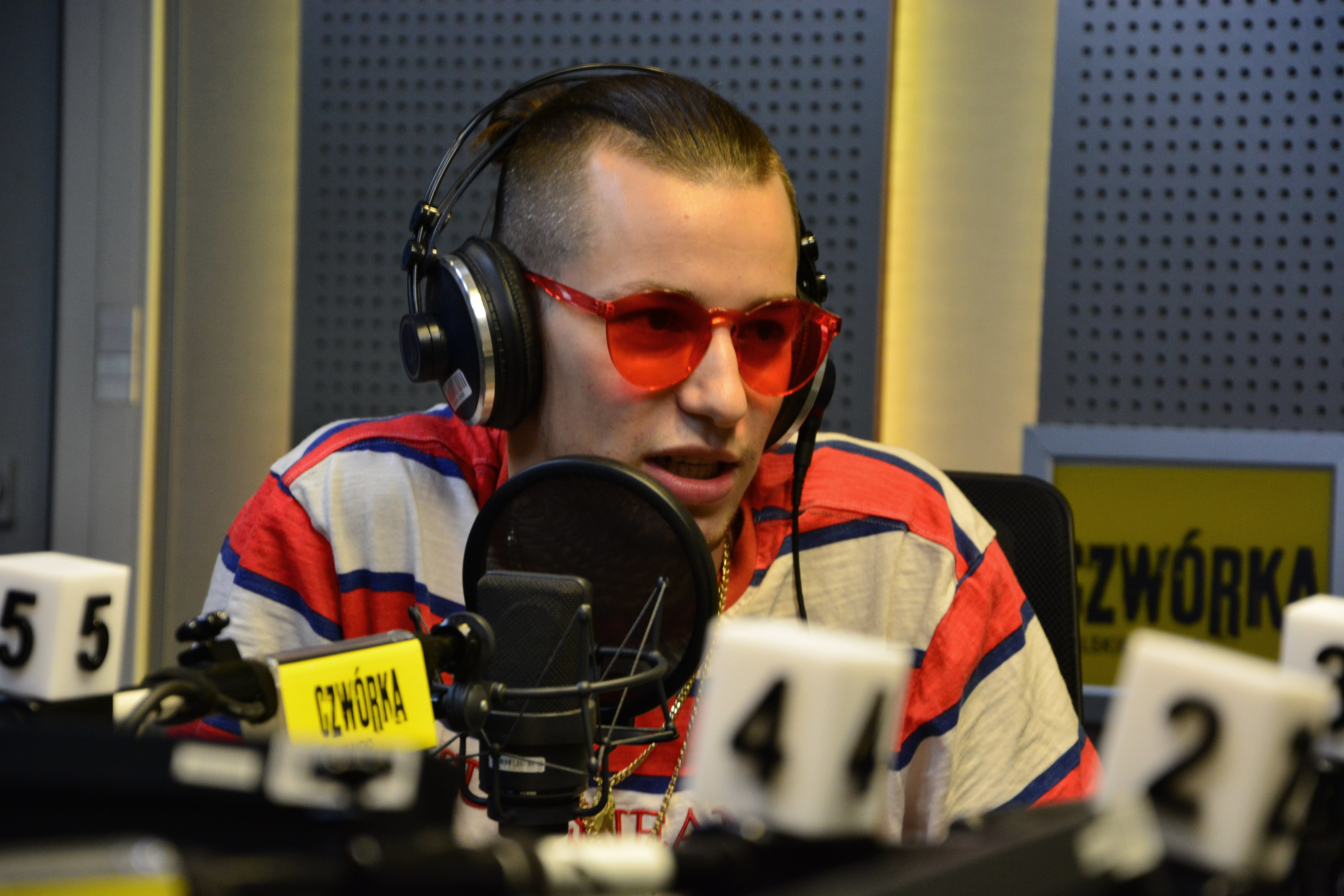 Żabson podczas wywiadu w Czwórce z okazji premiery EK-ki „Trapollo”.